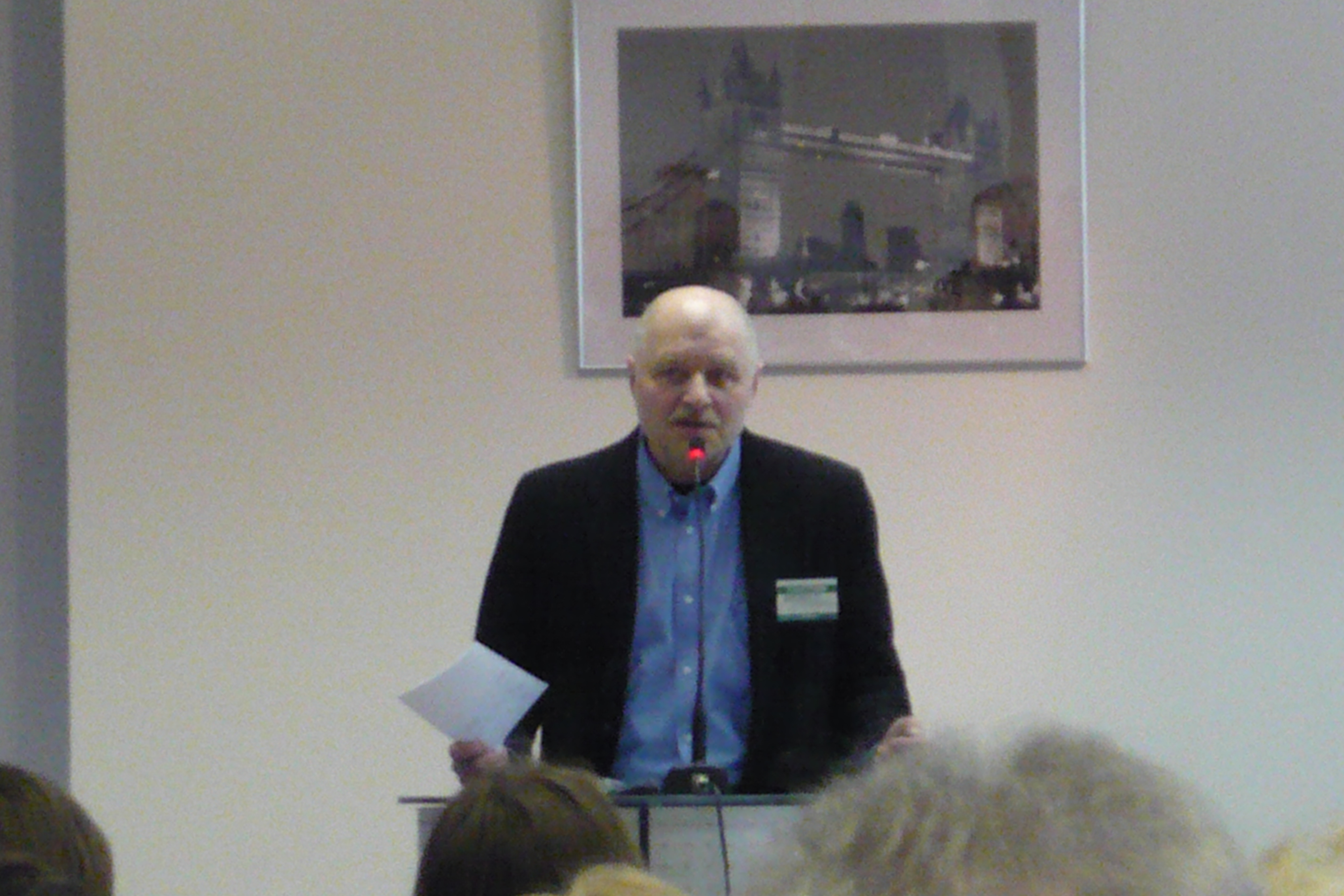 Учредительная конференция московского городского отделения движения Солидарность